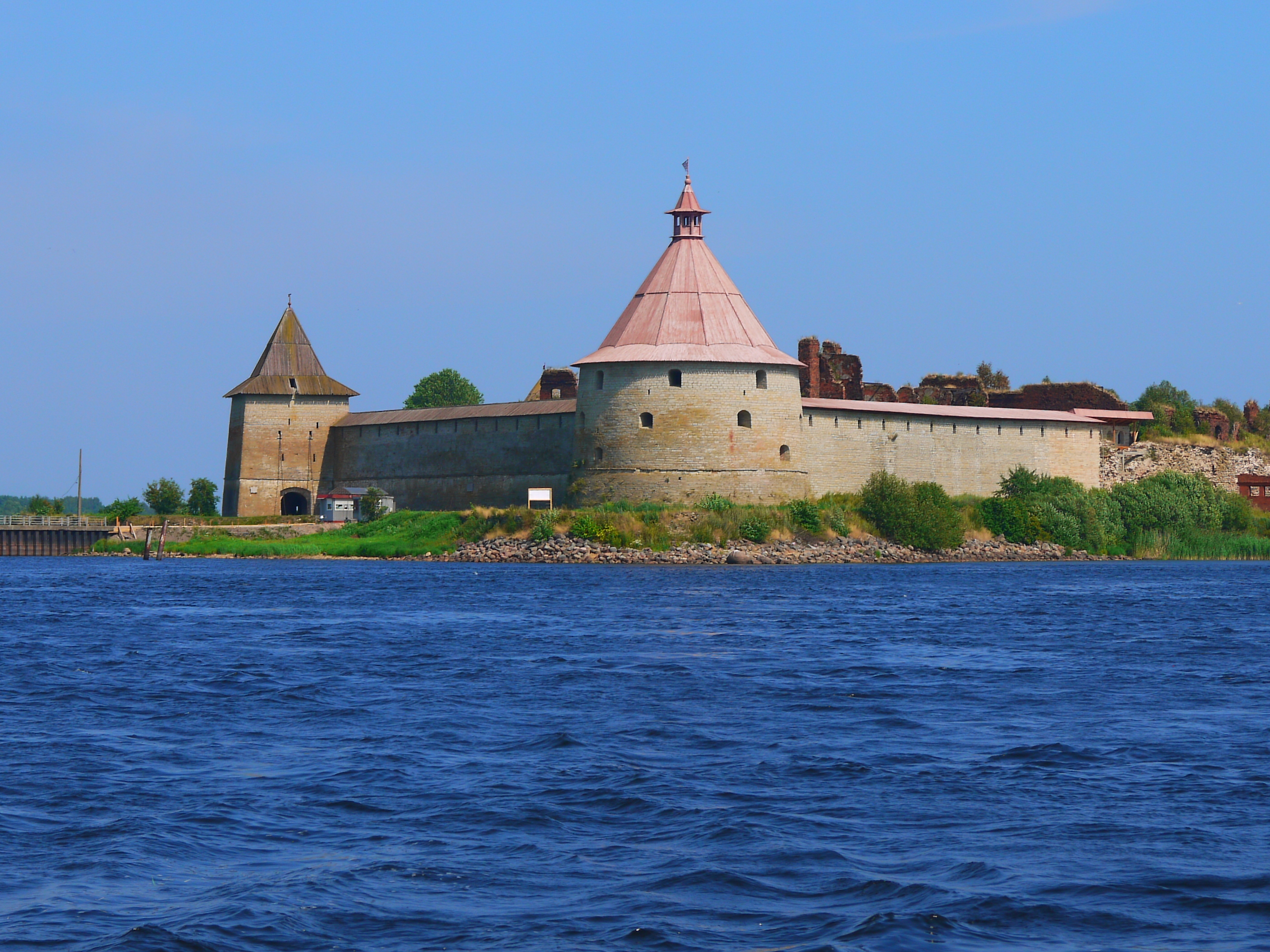 Ансамбль крепости Орешек (Шлиссельбургская крепость-тюрьма): Ореховый остров, Шлиссельбург, Кировский район, Ленинградская область